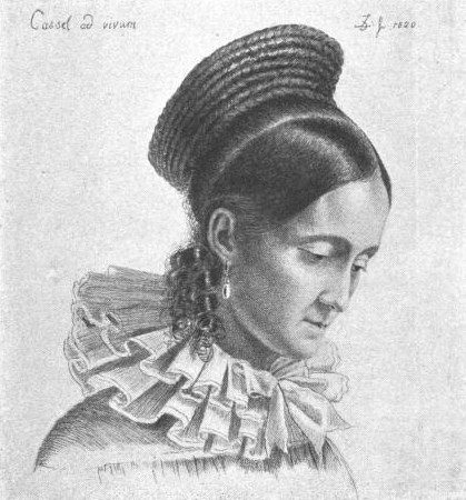 Charlotte Hassenpflug, geb. Grimm; gezeichnet von ihrem Bruder Ludwig Emil Grimm